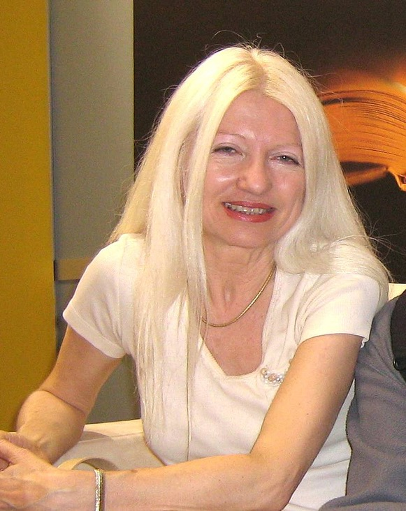 Małgorzata Niezabitowska (ur. 25 listopada 1948) – prawnik i dziennikarka.